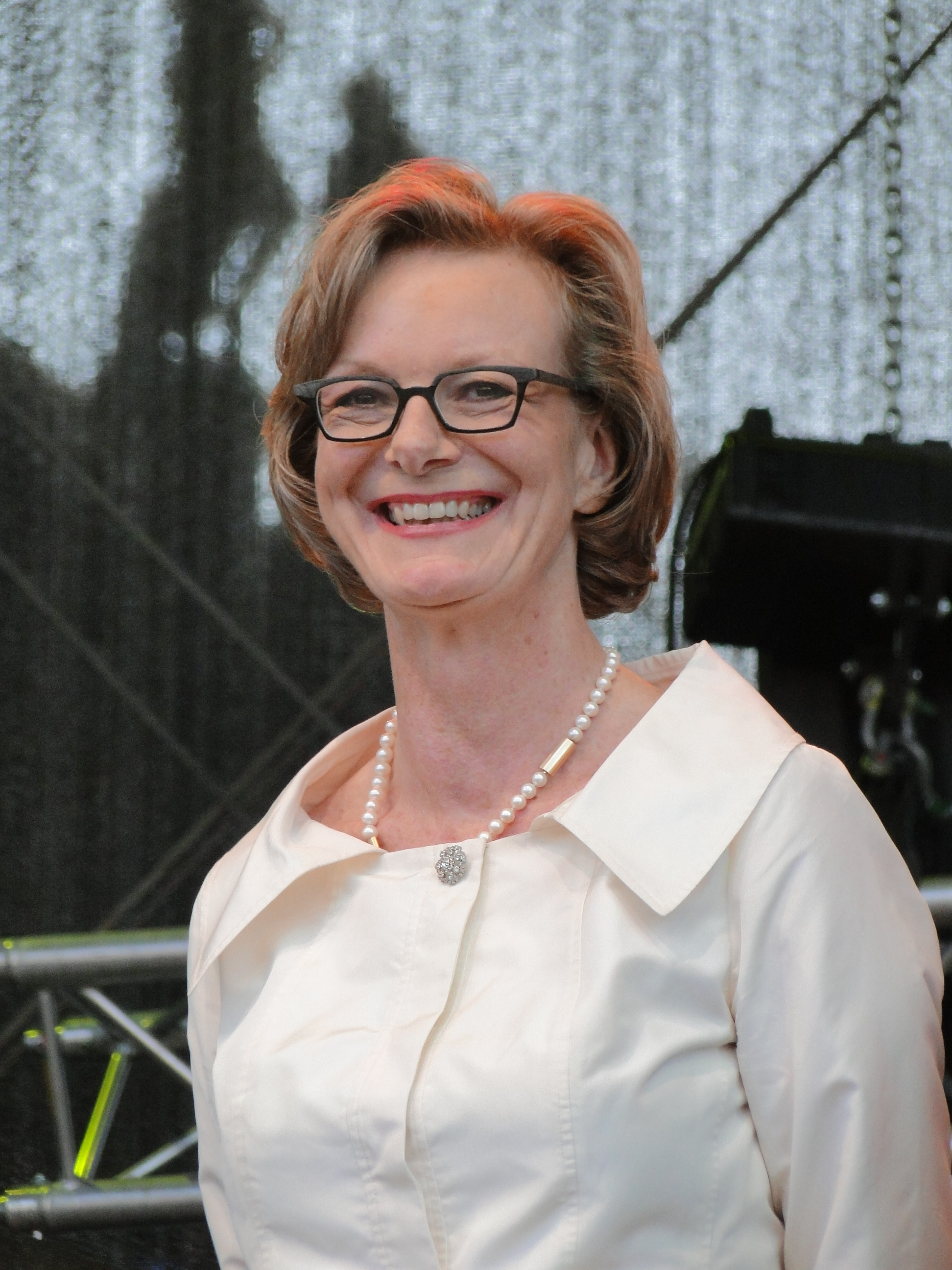 Ulrike Hessler (1955-2012), Intendantin der Dresdner Semperoper, im August 2010 in Dresden